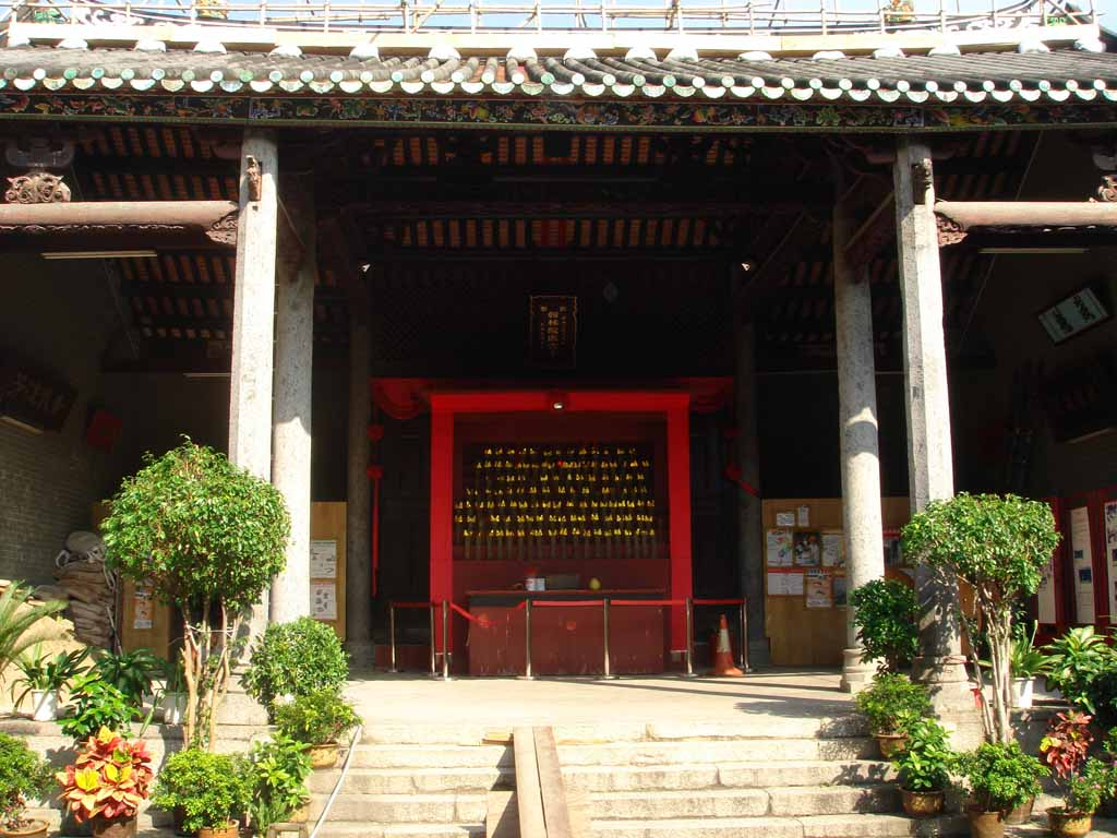 中文（香港）: 鄧氏宗祠神樓。